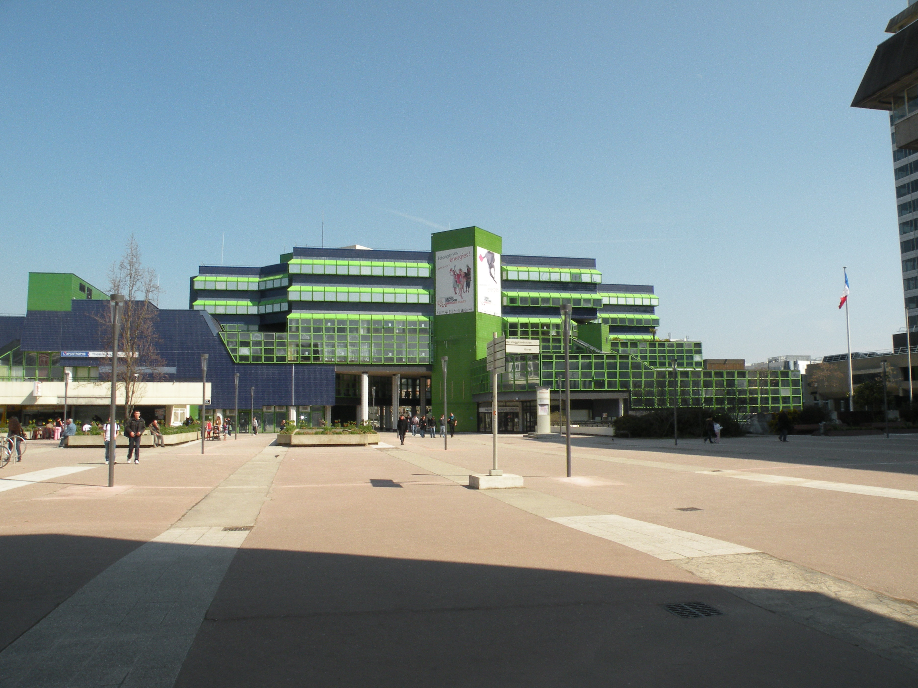 hotel d'aglomeration de cergy, val d'oise, france